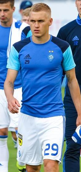 Віктор Буяльський - український футболіст